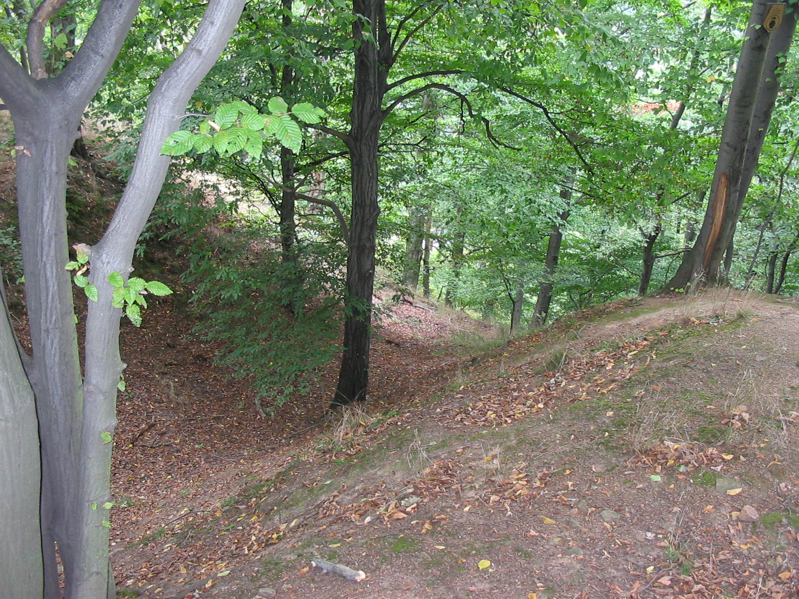 Blick vom Todhübel (Wirtschaftshoffläche) in den tiefen Graben Richtung Dorfgrund